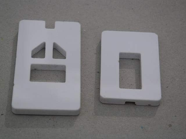 Plaquettes d'alumine d'un robinet mitigeur